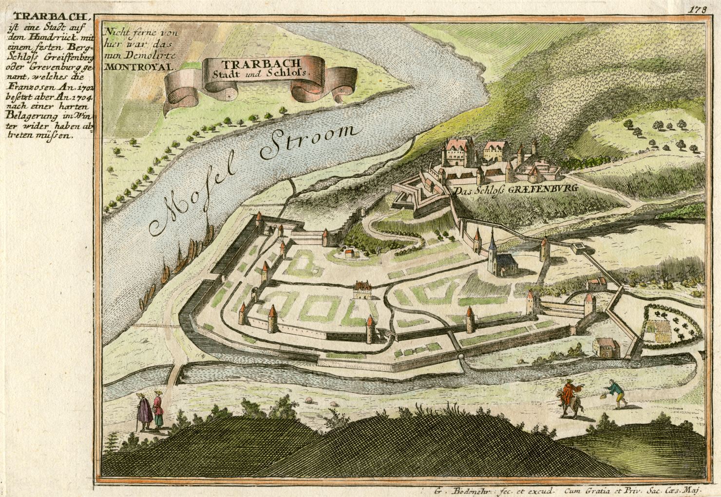 Kupferstich der Stadt Trarbach (Mosel) samt Grevenburg